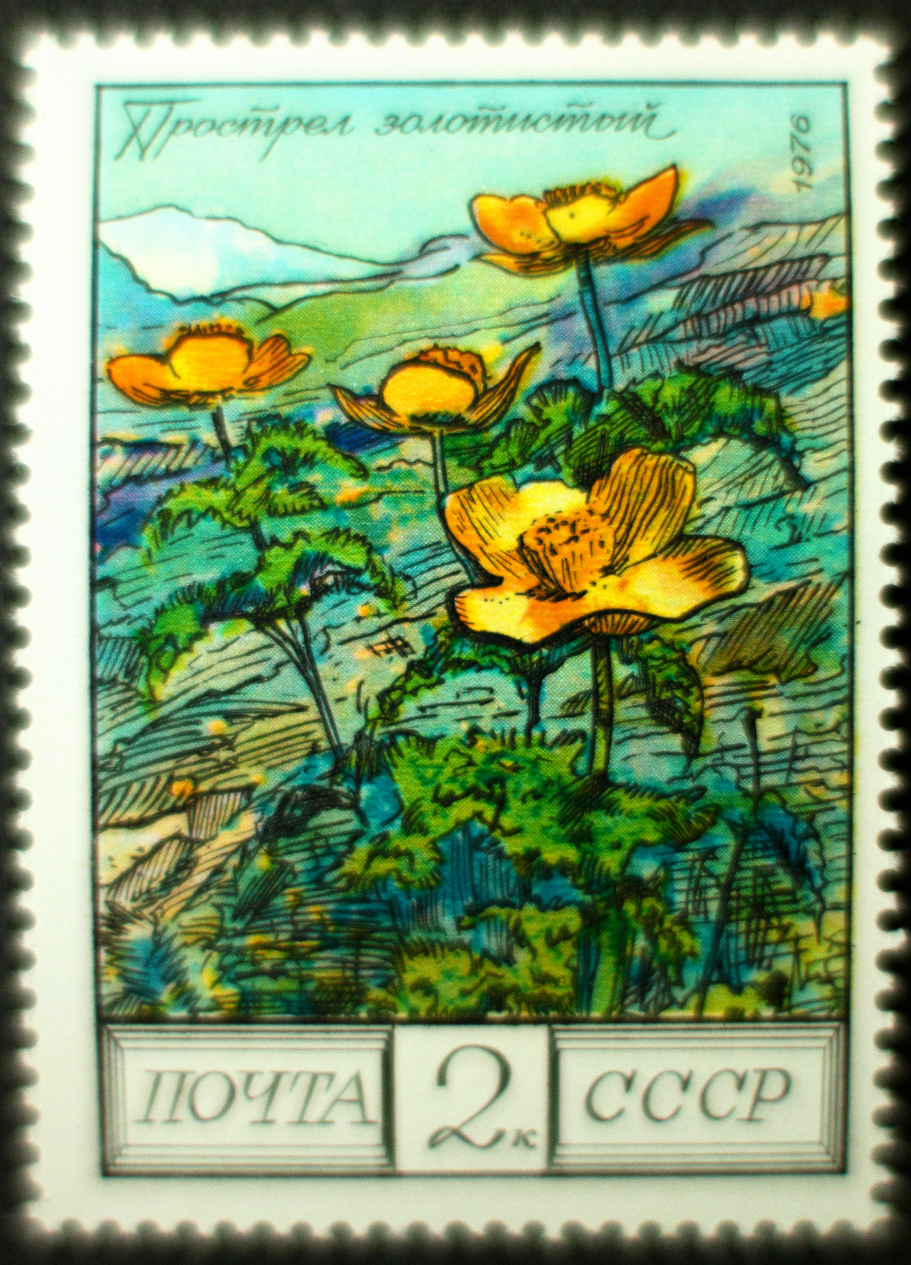 Briefmarke, Sowjetunion